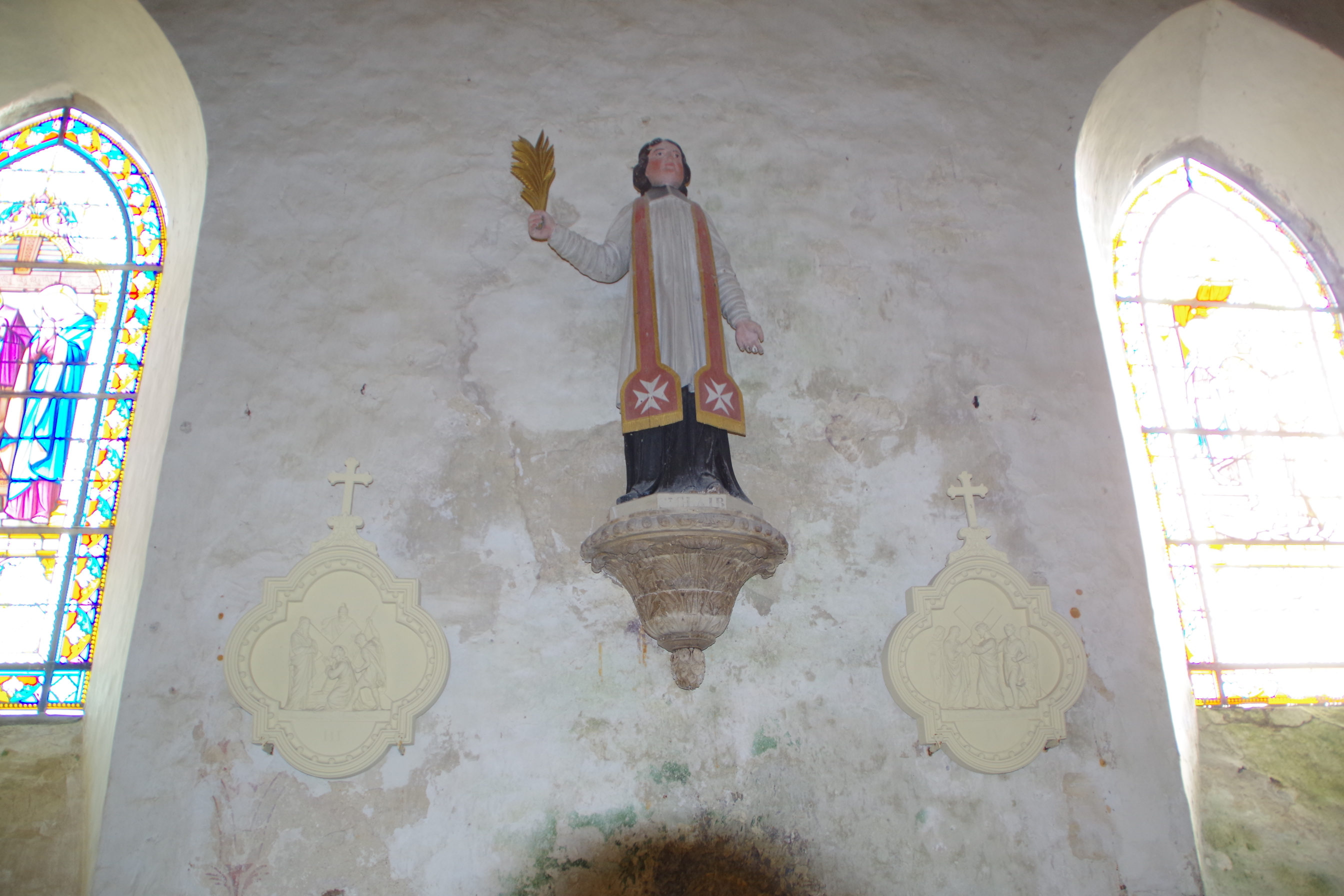 Statue de St Clair dans l'église de Savigny (Manche)